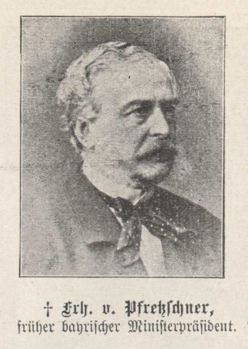 Adolph von Pfretzschner, Bayerischer Ministerpräsident